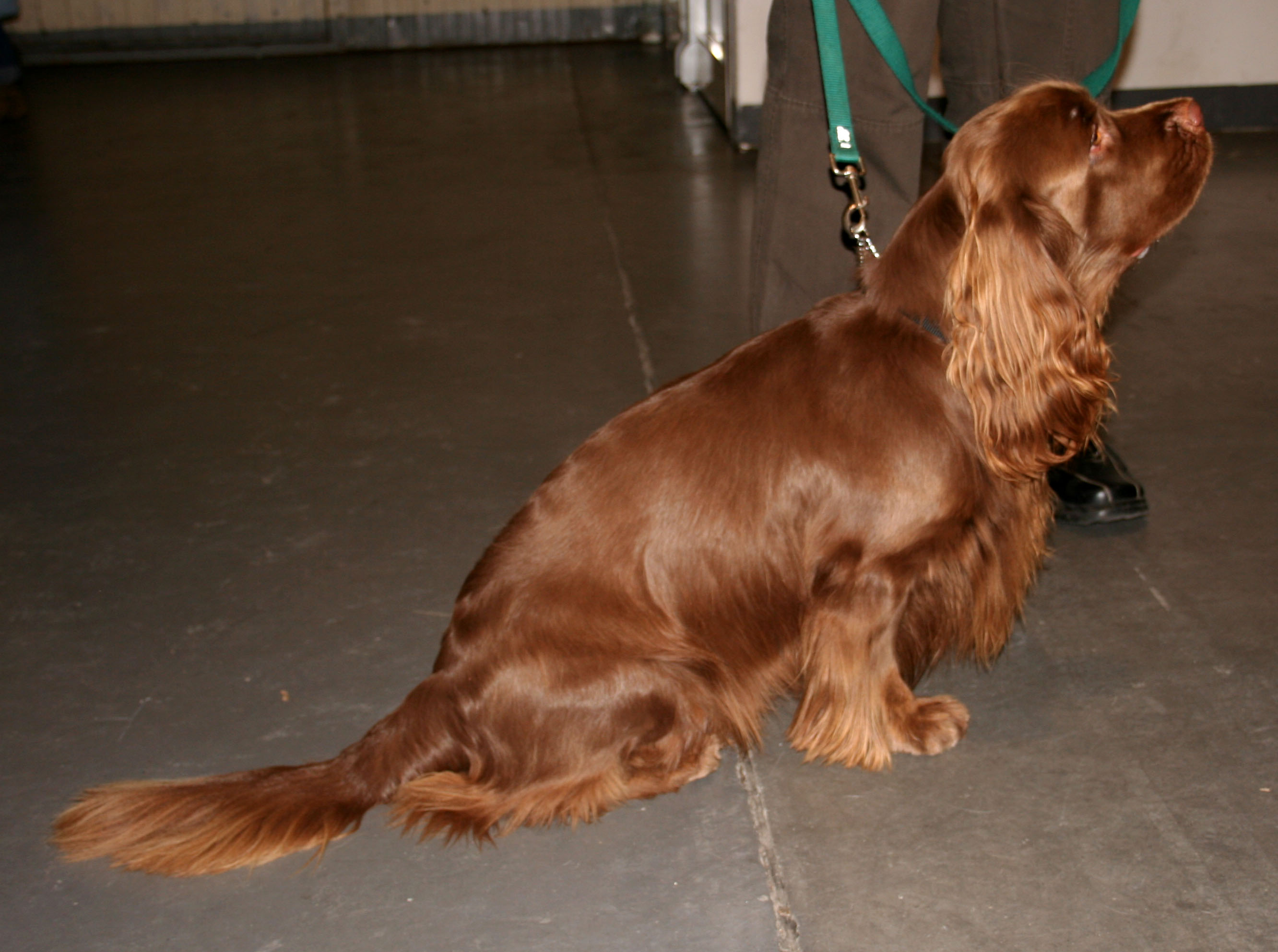 Sussex_spaniel na Światowej Wystawie Psów Rasowych w Poznaniu